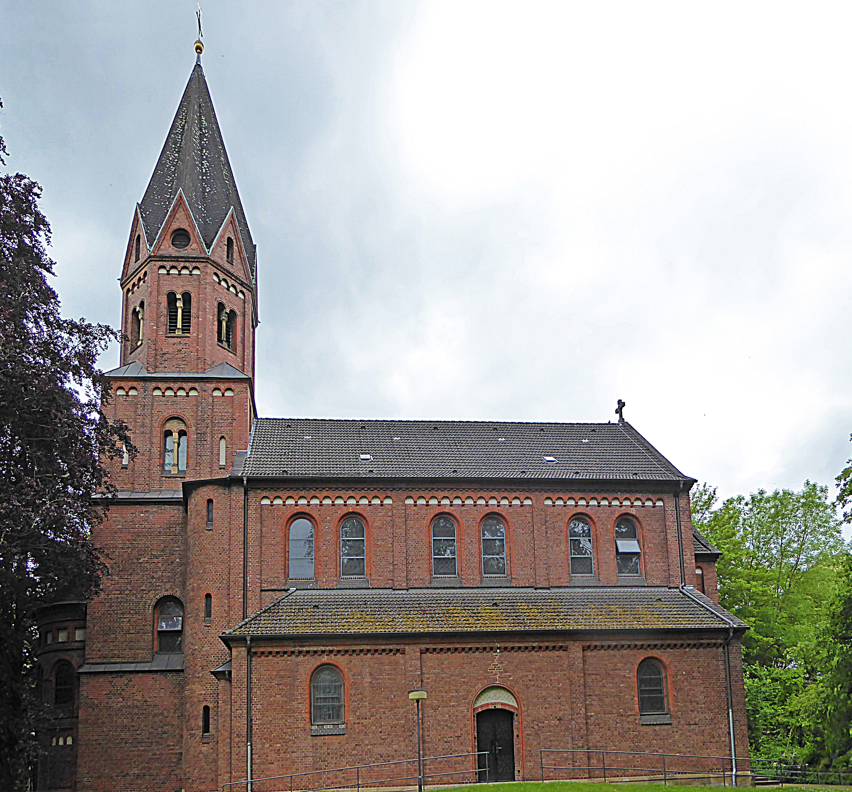 Pfarrkirche St. Josef (Einbeck) von Norden